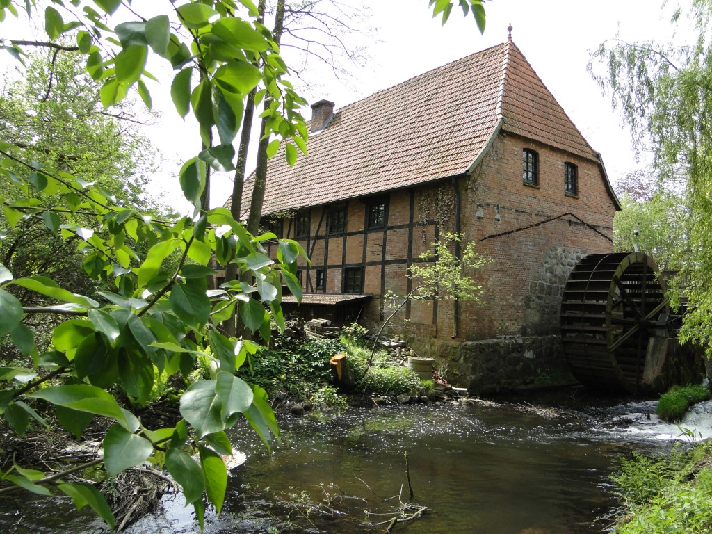 Holmer Mühle Rückansicht